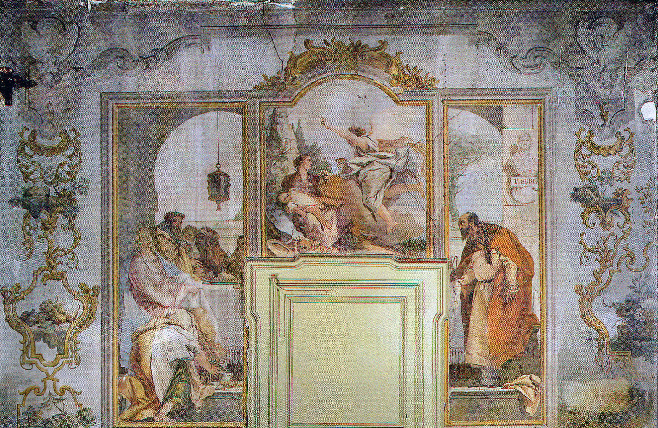 Studiolo dell'abatepart1